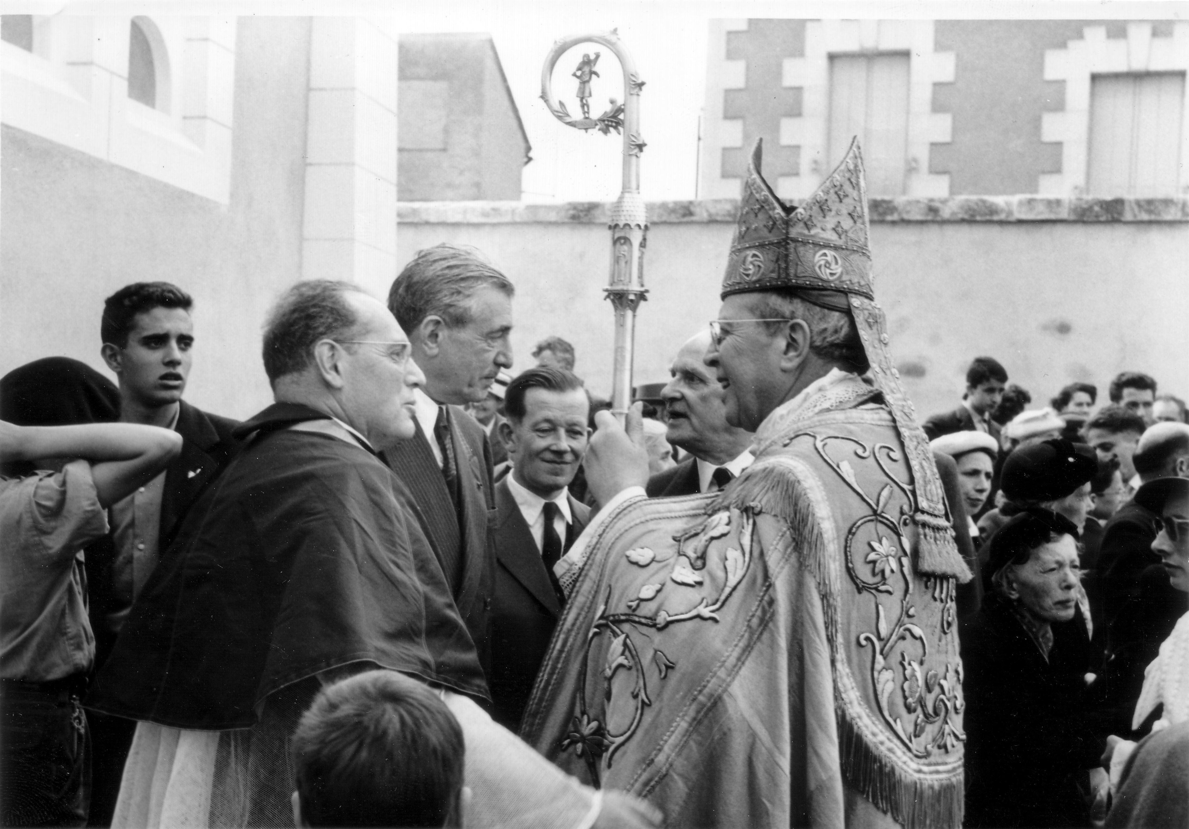 Max Hymans, maire de Valençay, accueille l'archevêque de Bourges, à l'occasion des obsèques duc de Talleyrand-Périgord. On distingue, à gauche de la photo, la chapelle privée de la famille des Talleyrand-Périgord, refaite après l'incendie de Valençay en 1944.